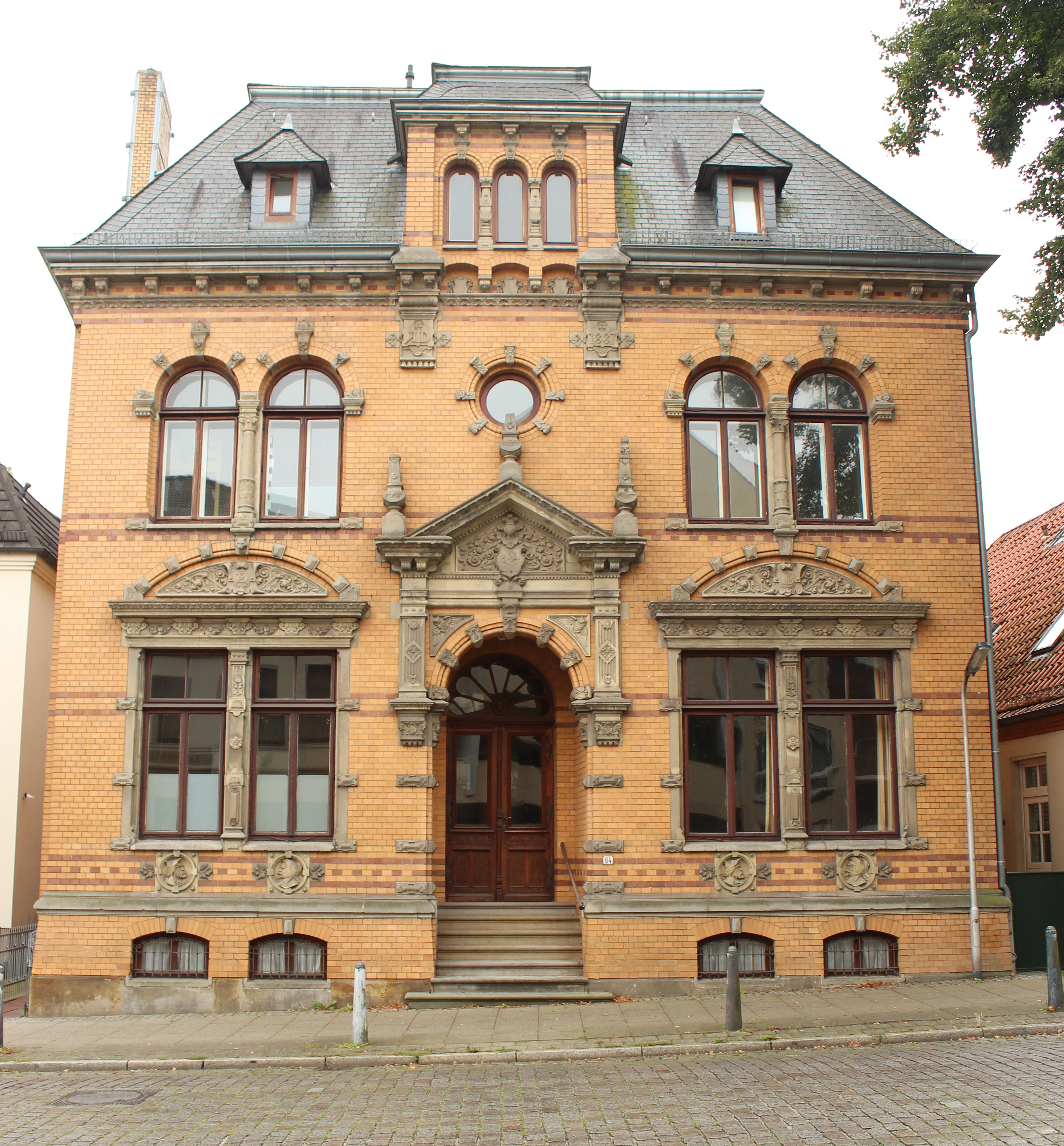 Villa Bischoff in Bremen, Weserstraße 84.Das abgebildete Objekt ist ein geschütztes Kulturdenkmal in der Freien Hansestadt Bremen, mit der Nr. 1337 beim Landesamt für Denkmalpflege registriert.